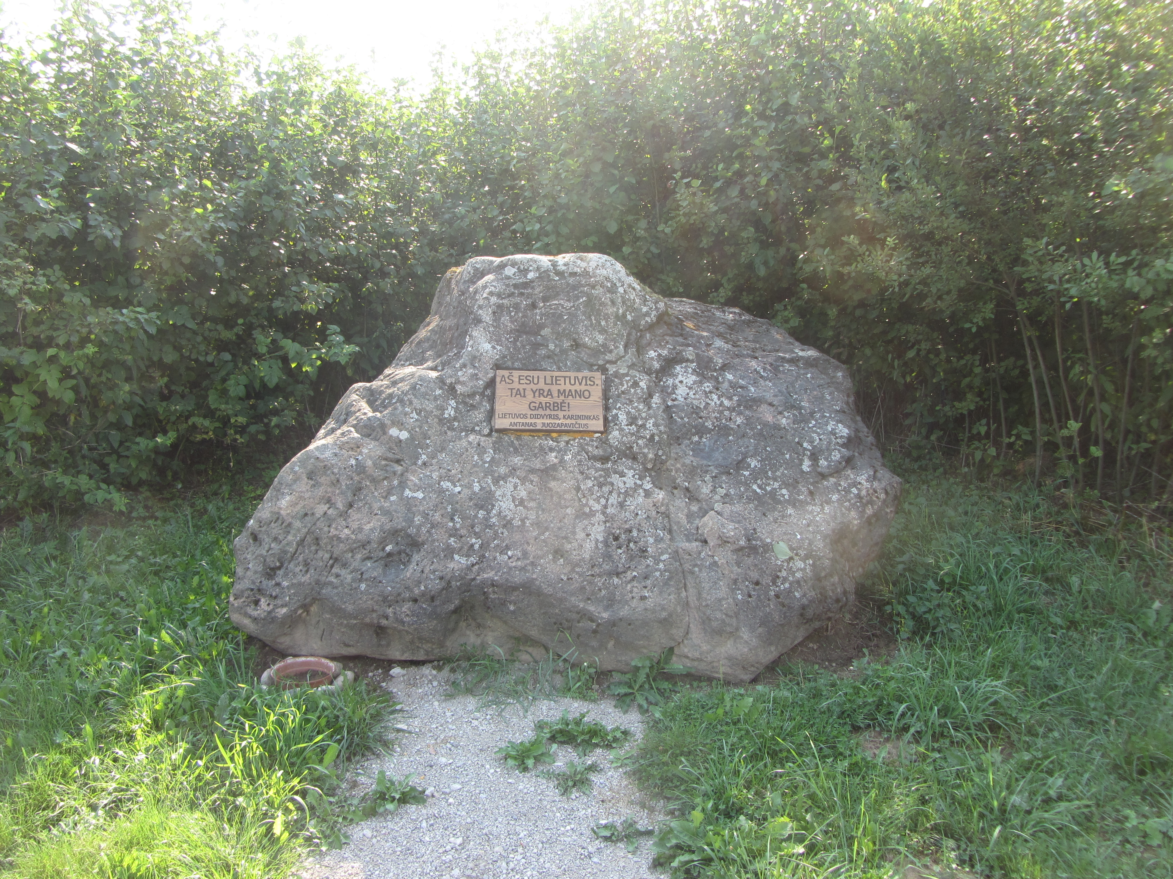 Medininkų sen., Lithuania